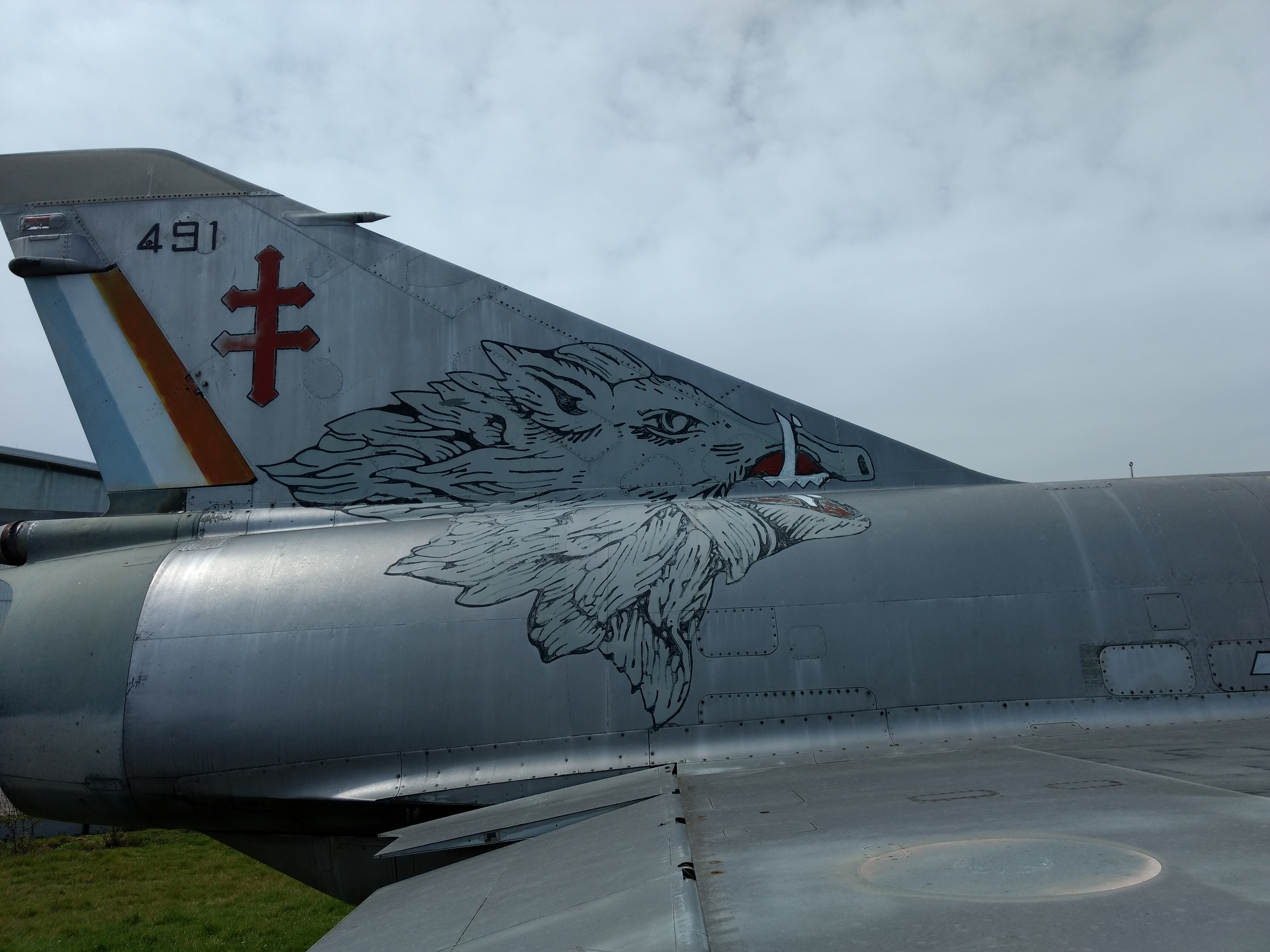 Photo collection personnelle prise à Blagnac.